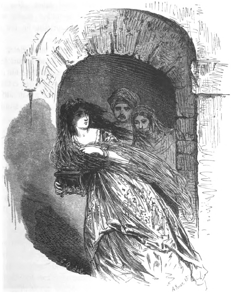 Die Flucht Fatmes und Zoraides. Szene aus Die Errettung Fatmes